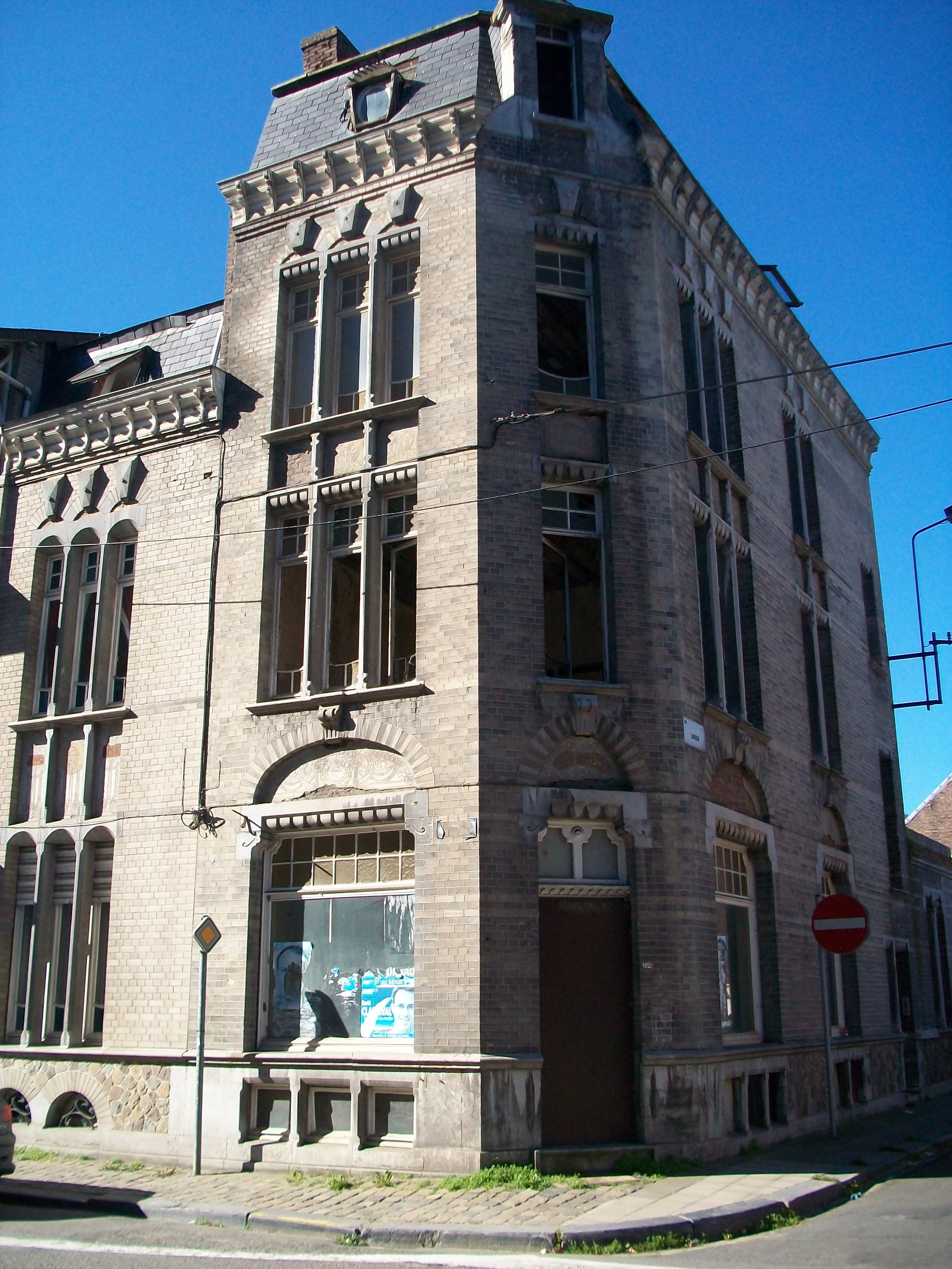 Villa À l'oiseau bleu Art nouveau 1908 Jambes